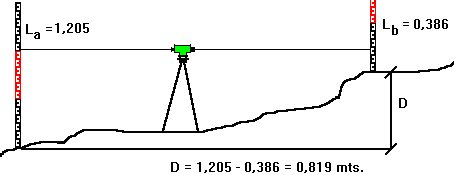 Calculo del desnivel existente entre dos puntos